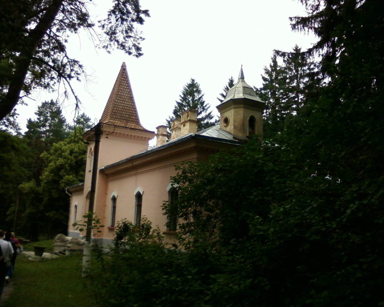 Садиба у Наталівському парку, с-ще Володимирiвка